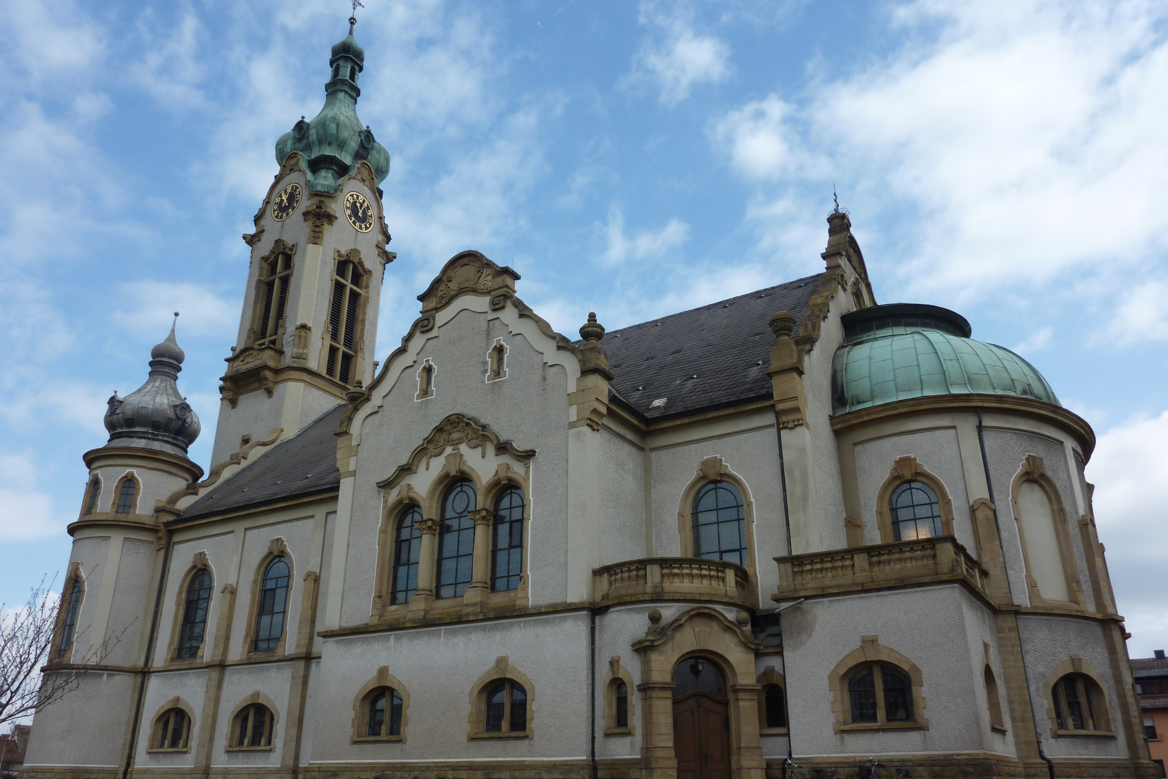 Evangelische Kirche in Hockenheim, Westseite